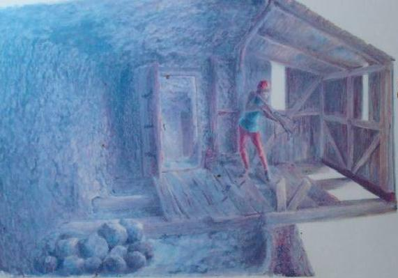 site des grottes troglodytique de Jonas en Auvergne, Détail d'une bretèche.